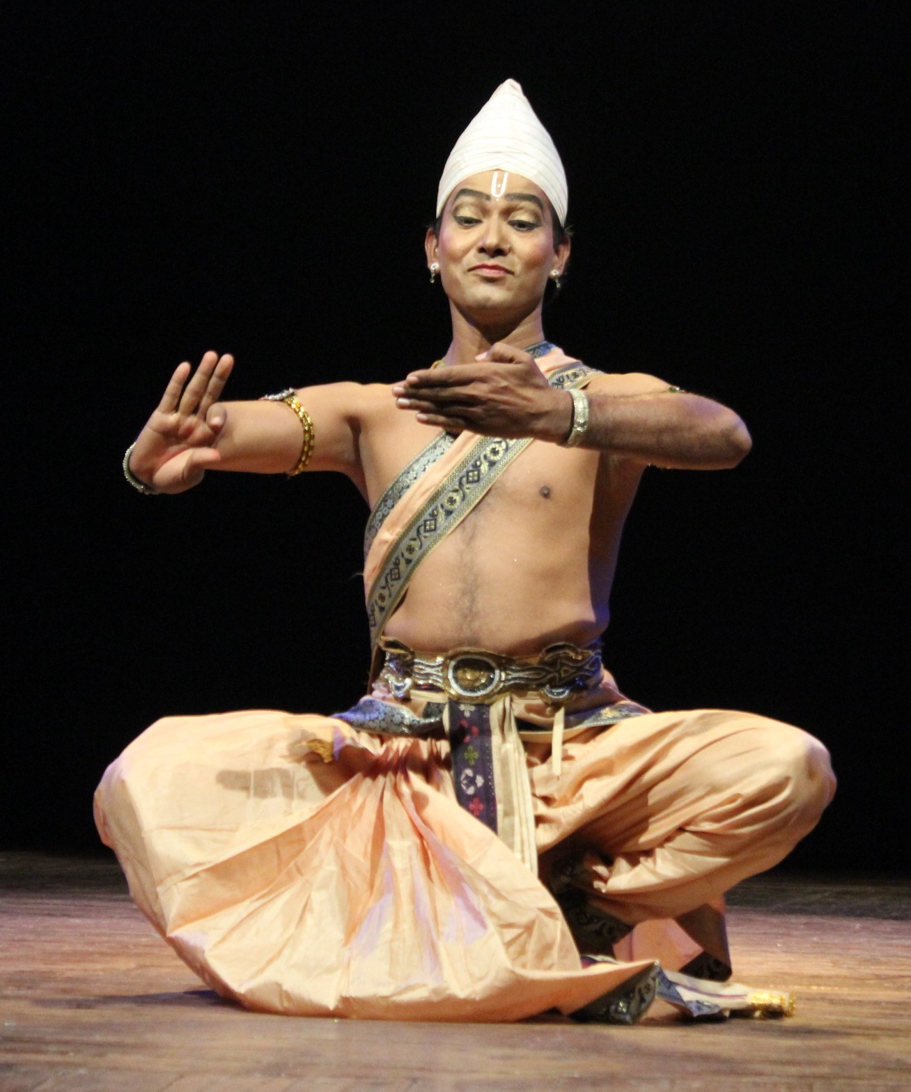 অসমীয়া: গুৱাহাটীৰ ৰবীন্দ্র ভৱনত সঙ্গীত নাটক আকাদেমিৰ গুৱাহাটী শাখাৰ দ্বাৰা আয়োজিত ‘নৃত্য পর্ব’ অনুষ্ঠানত (১৫-১১-২০১১)সত্রীয়া নৃত্য পৰিবেশনাত গুৰু ৰামকৃষ্ণ তালুকদাৰ।